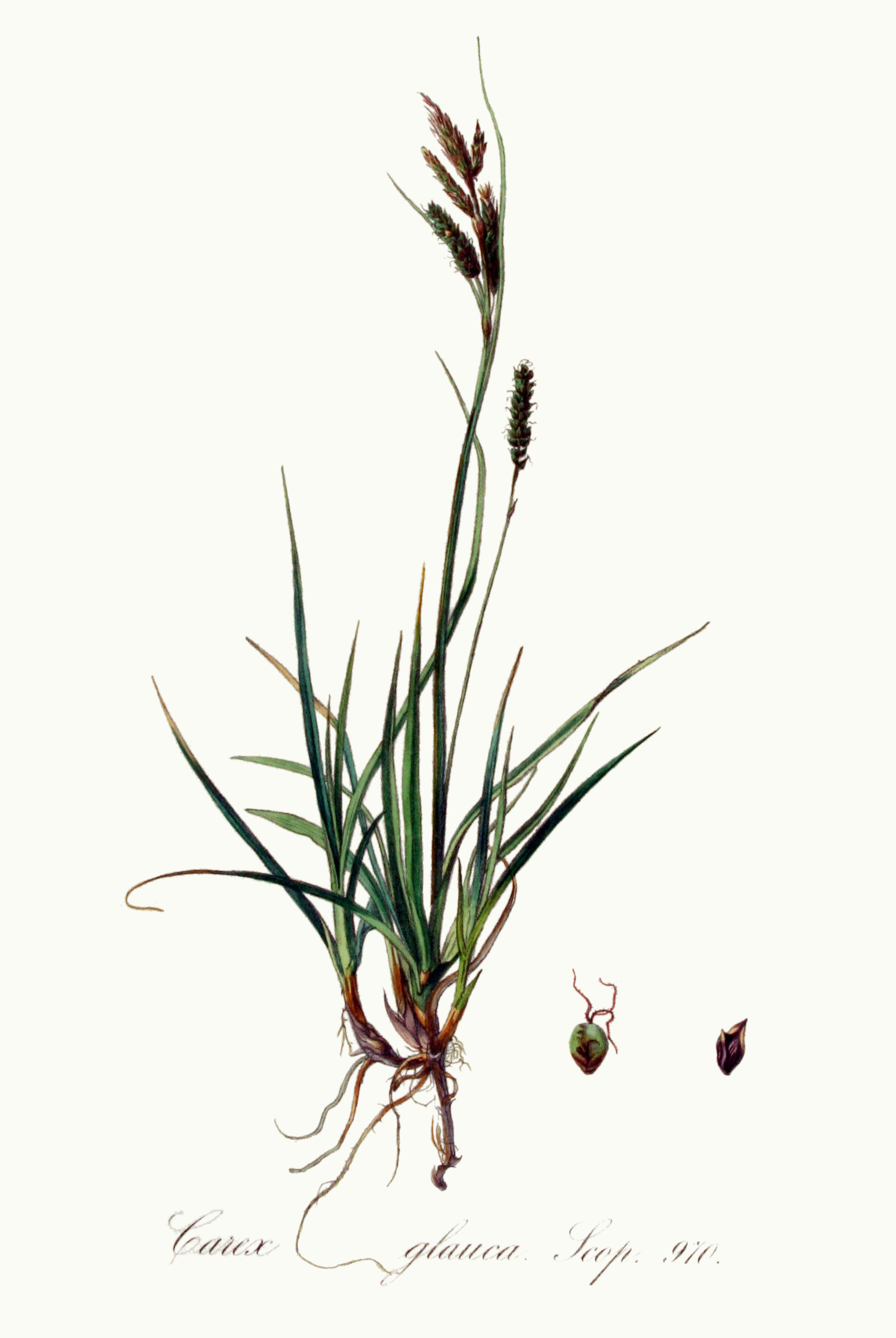 Carex flacca Scheb. (Syn. Carex glauca Scop.)